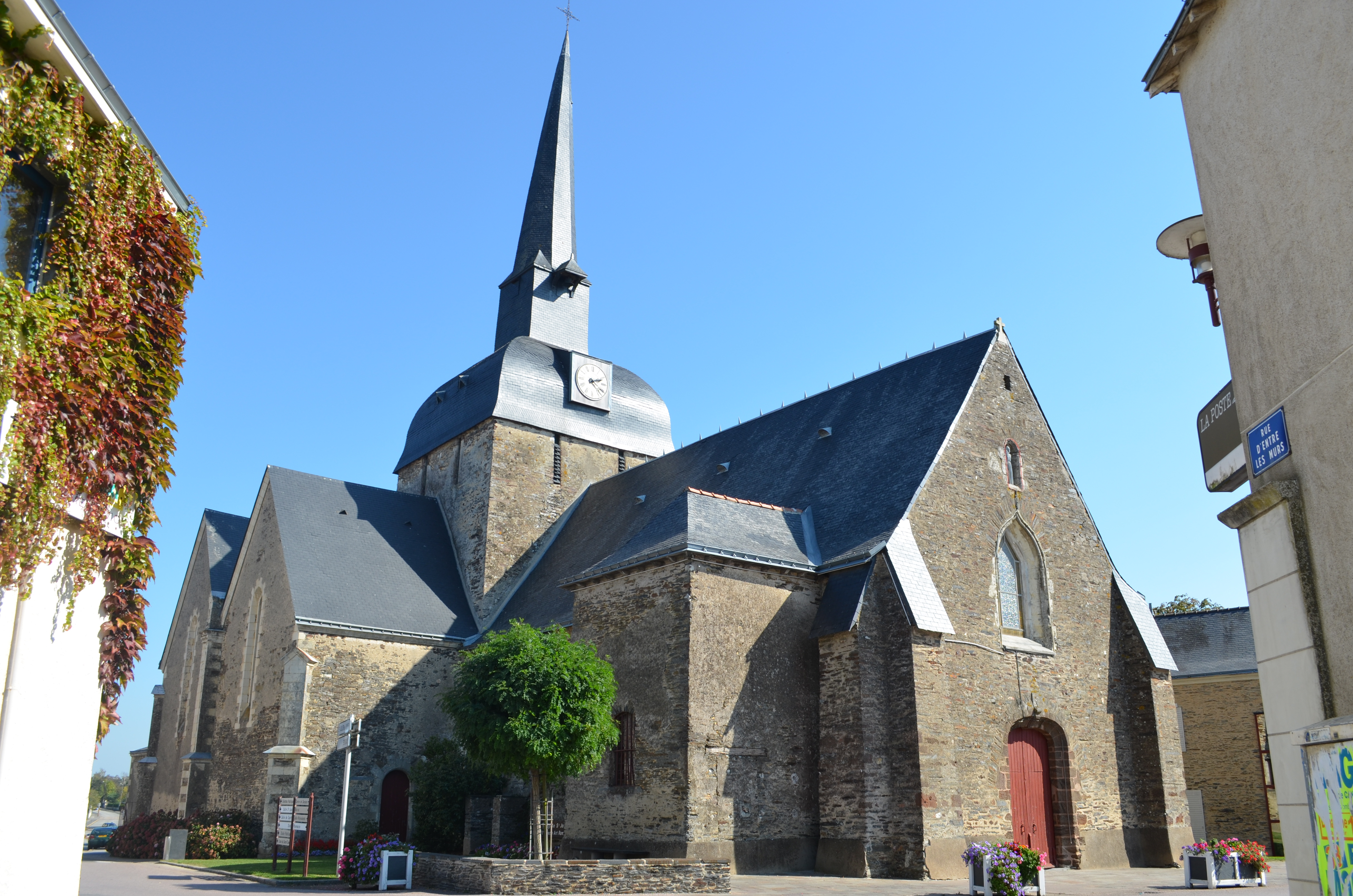 Église Saint-Jouin 11e s. - Moisdon-la-Rivière (Loire-Atlantique) .